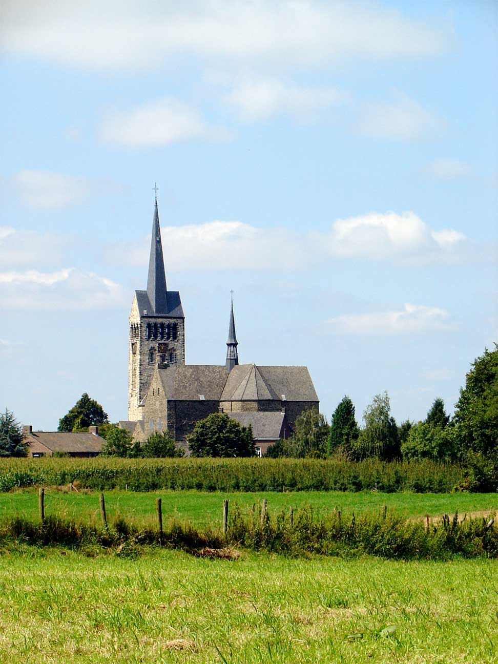 Remigiuskerk in Schimmert(Limburg)